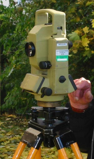 Tachymeter der Firma Wild